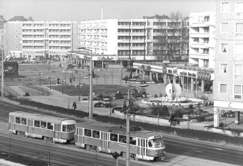 Dresden, Neustädter Markt, Wohnblocks, Straßenbahn ADN-ZB Häßler 11.2.82 Dresden: Der Neustädter Markt erstand in den vergangenen Jahren durch die fleißige Arbeit vieler Bauleute aus dem Bezirk und der Stadt Dresden neu. Dieser Platz ist Ausganspunkt für den Fußgängerboulevard Straße der Befreiung. Beim Luftangriff auf Dresden am 13. Februar 1945 wurde auch die Gegend um den Neustädter Markt total zerstört. (siehe zur Gegenüberstellung Archivfoto 0309-331N) Information added by Wikimedia users.